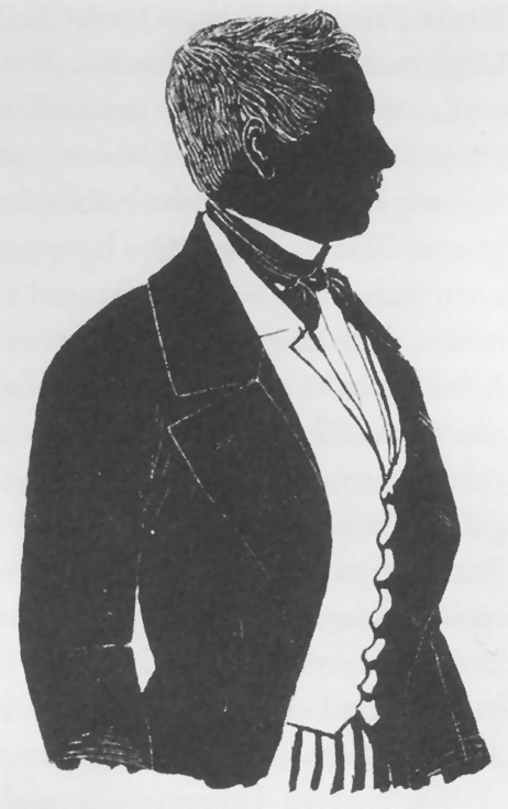 Friedrich Krupp (1787-1826), Gründer des Schwerindustrie-Unternehmens Krupp, zeitgenössischer Scherenschnitt